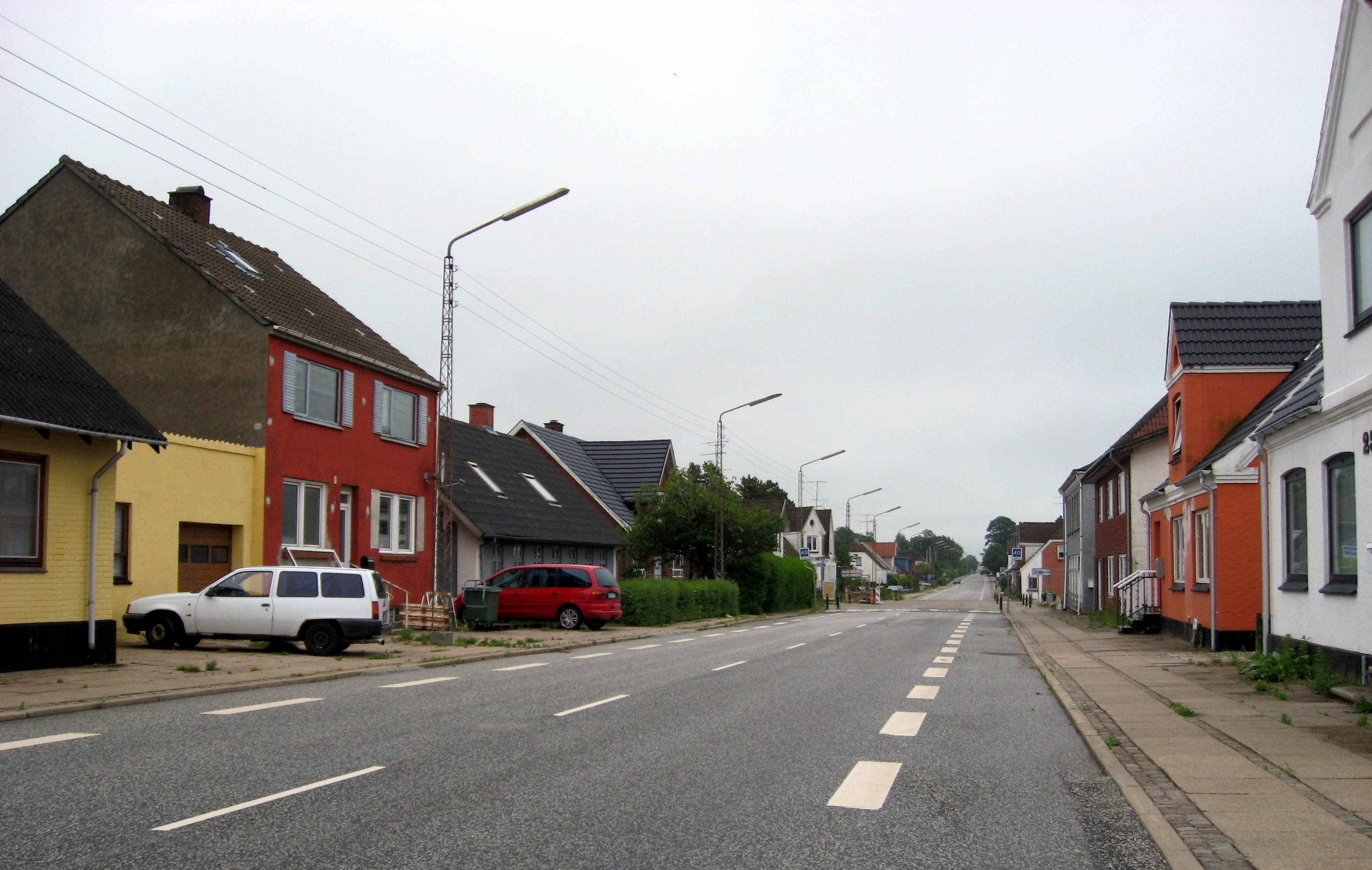 Thorshøj